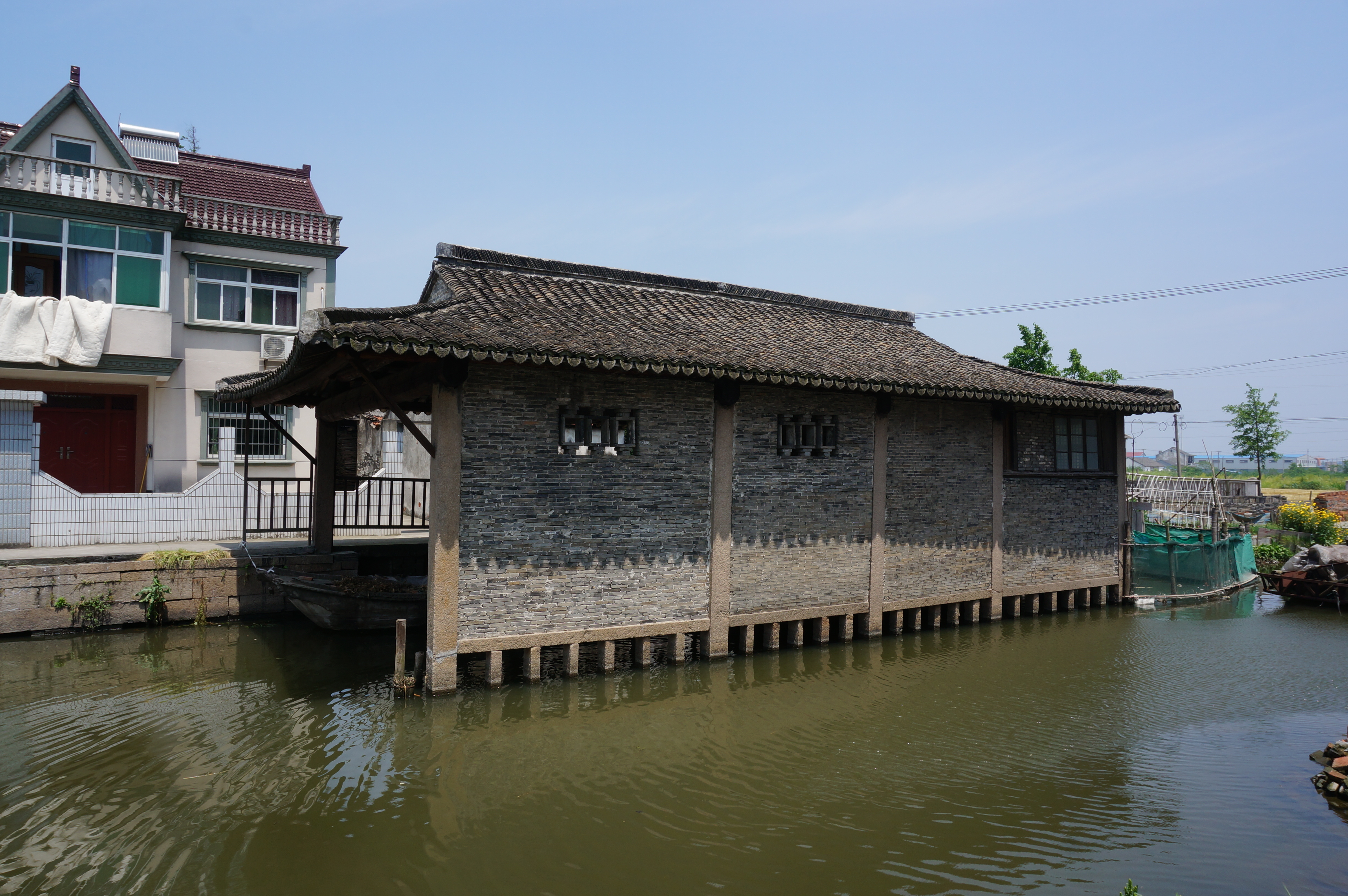 嘉善干窑镇钱氏船坞，西南侧。